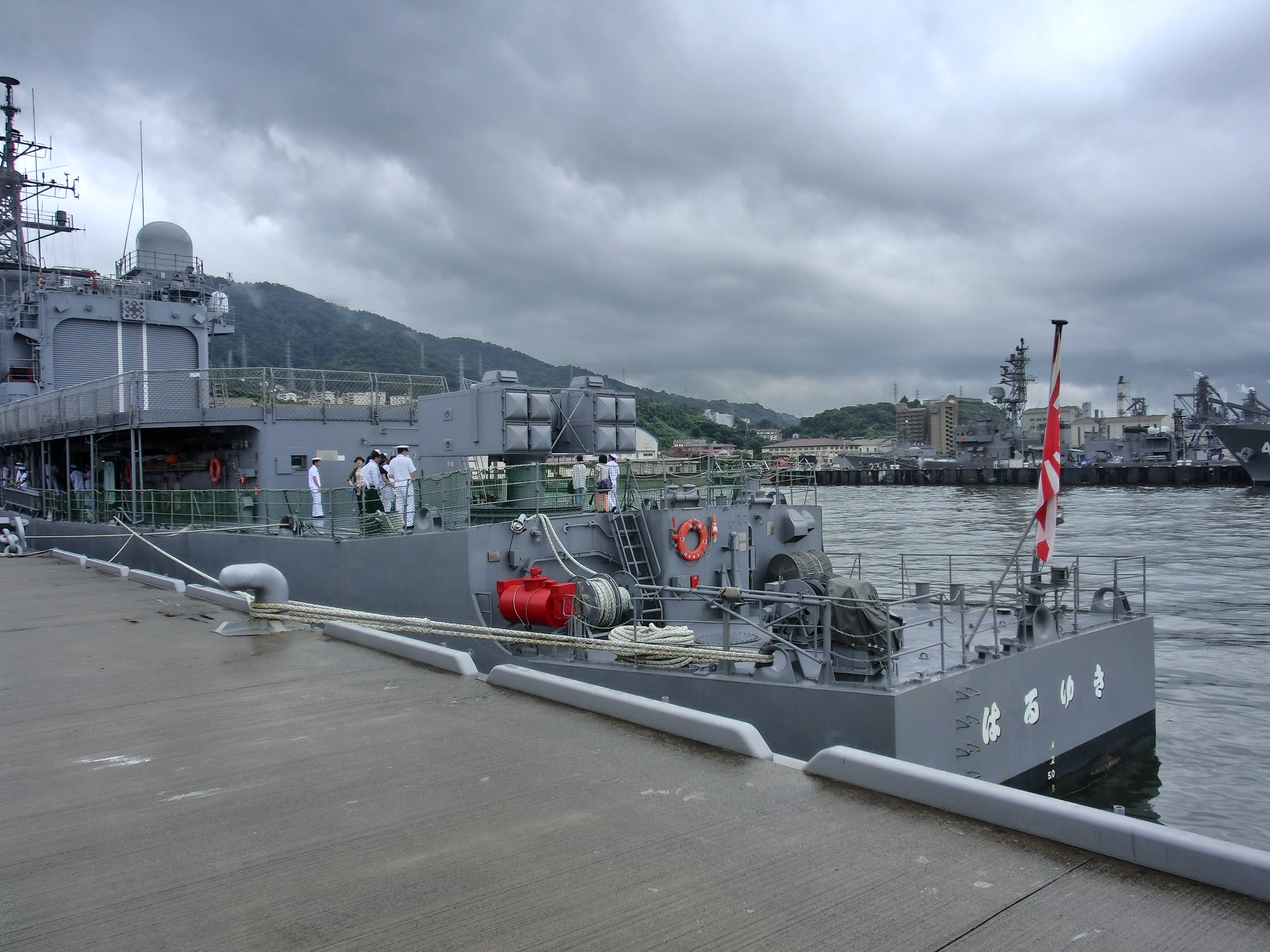 護衛艦はるゆきの後部甲板。呉・Eバースにて。